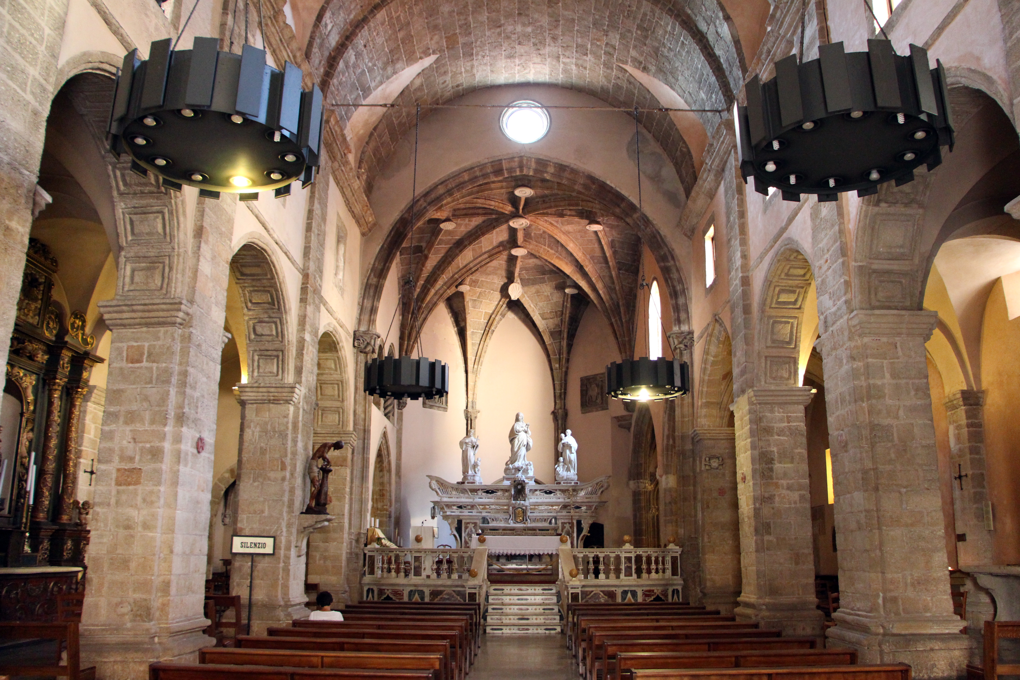 Alghero